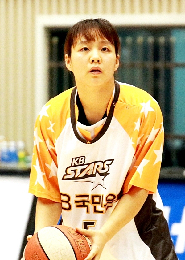 160220 여자농구 KDB생명 vs KB스타즈 직찍